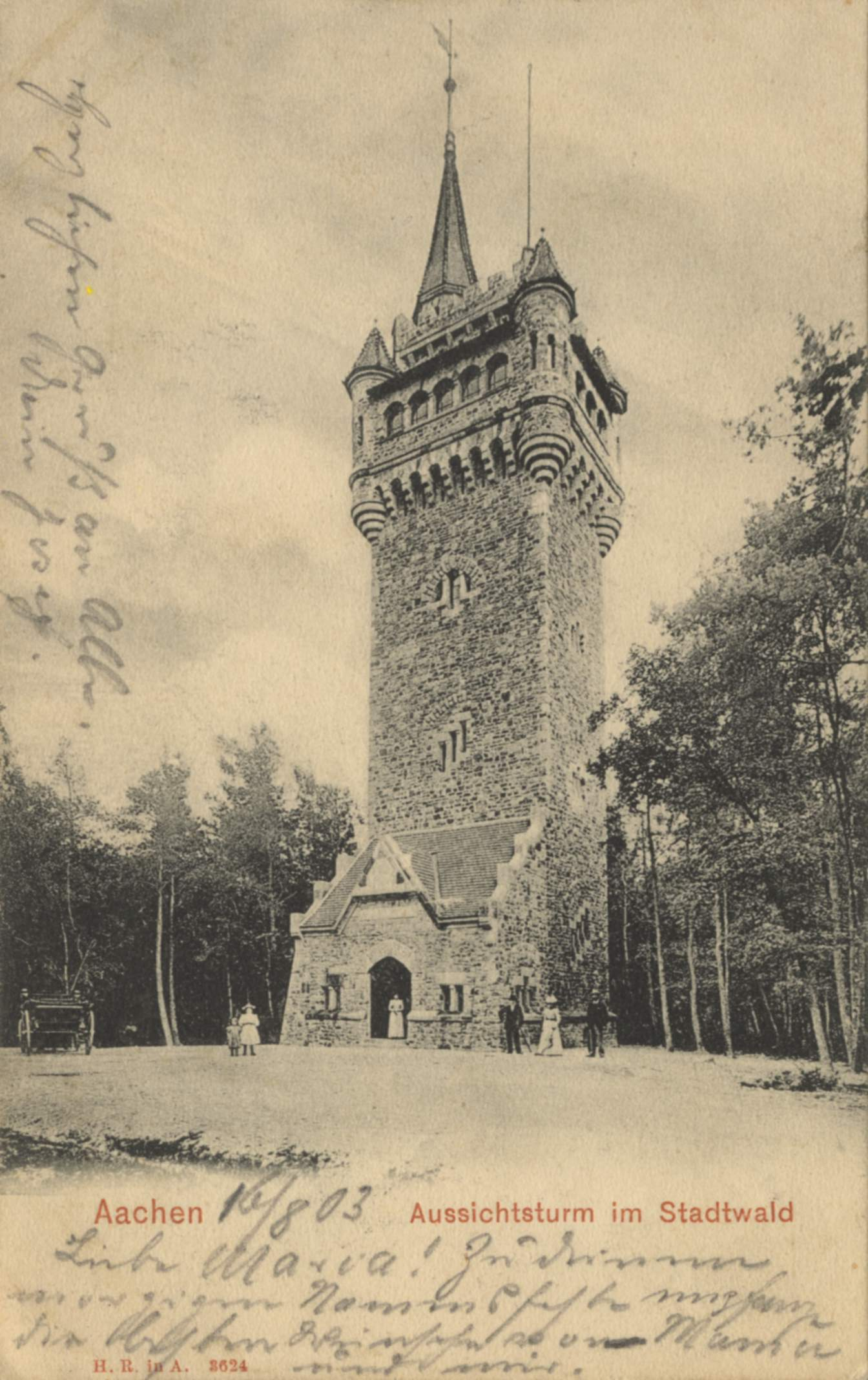 Pelzerturm im Stadtwald von Aachen